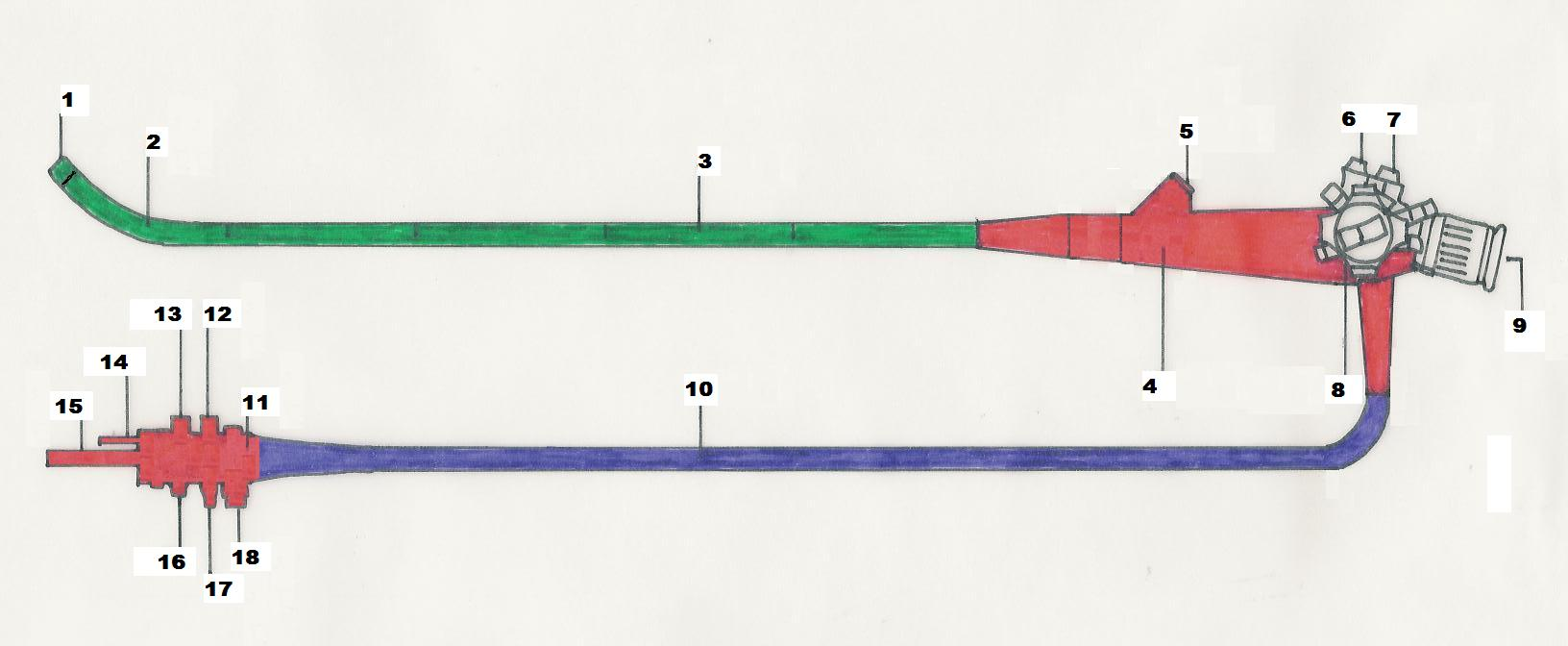 Schema eines Endoskops